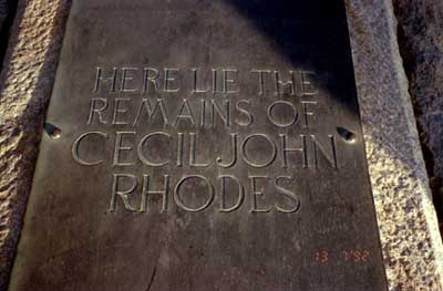 Grab von Cecil Rhodes im Matopo-Gebirge in Zimbabwe